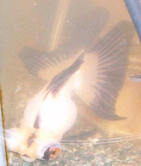 panda-chobi(goldfish)